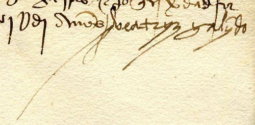 Firma hológrafo de Beatriz Galindo en una real cédula de Isabel I de 19 de marzo de 1501, ordenándole a su camarero Sancho de Paredes entregue a Beatriz Galindo un cáliz de plata para que ella lo donase a unos frailes de Las Alpujarras. Con su firma Beatriz Galindo confirma haber recibido el dicho cáliz.